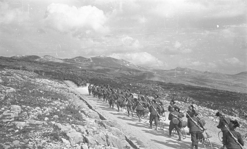 Jugoslawien 1941 Vormarsch zur Passhöhe von Sinj (italienische Radfahrertruppe) Information added by Wikimedia users.